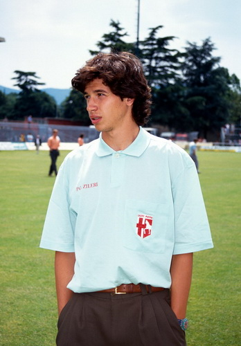 Demetrio Albertini ai tempi del Padova, stagione di Serie B 1990-1991. Licensing 1990-1991